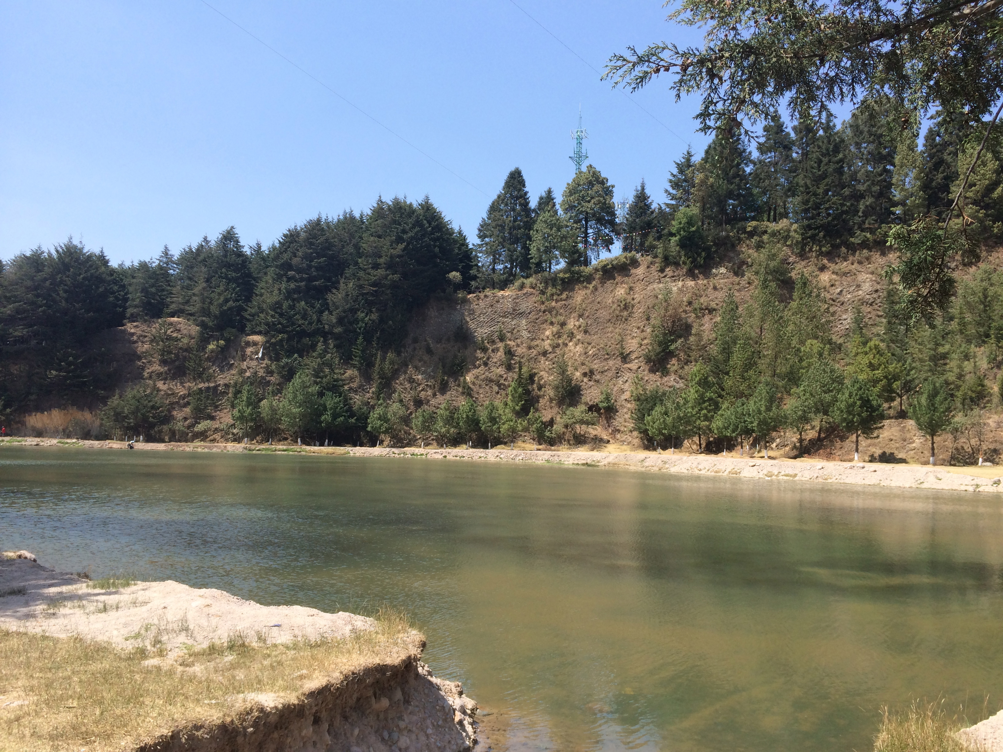 La marquesa caballerizas y lago